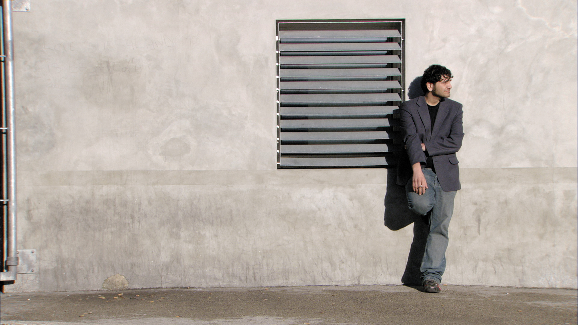 Fahad dans la cour du centre d’enregistrement et de procédure pour requérant d’asile de Vallorbe. Image tirée du film « La forteresse » de Fernand Melgar